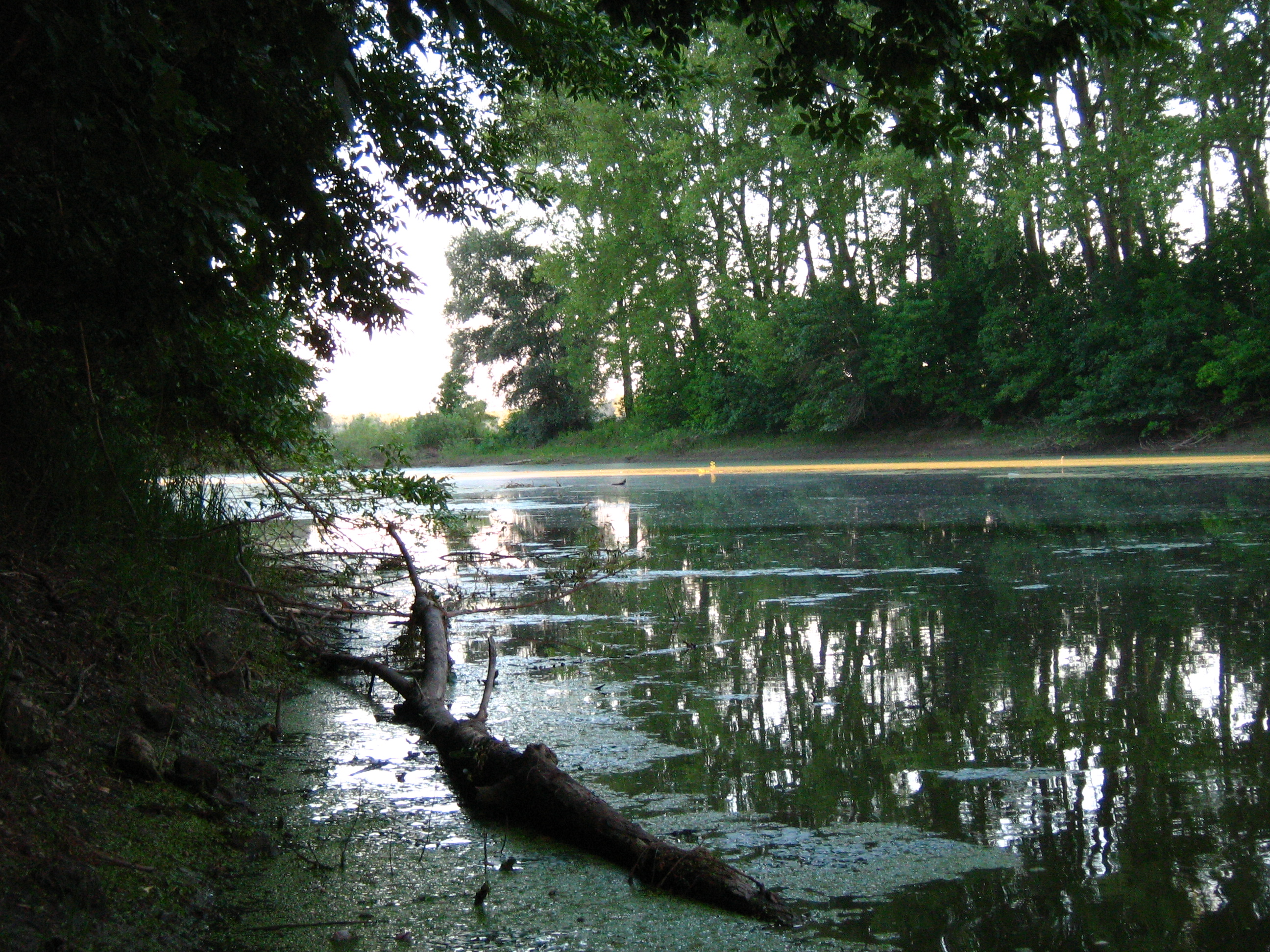 Harčaški dunavac